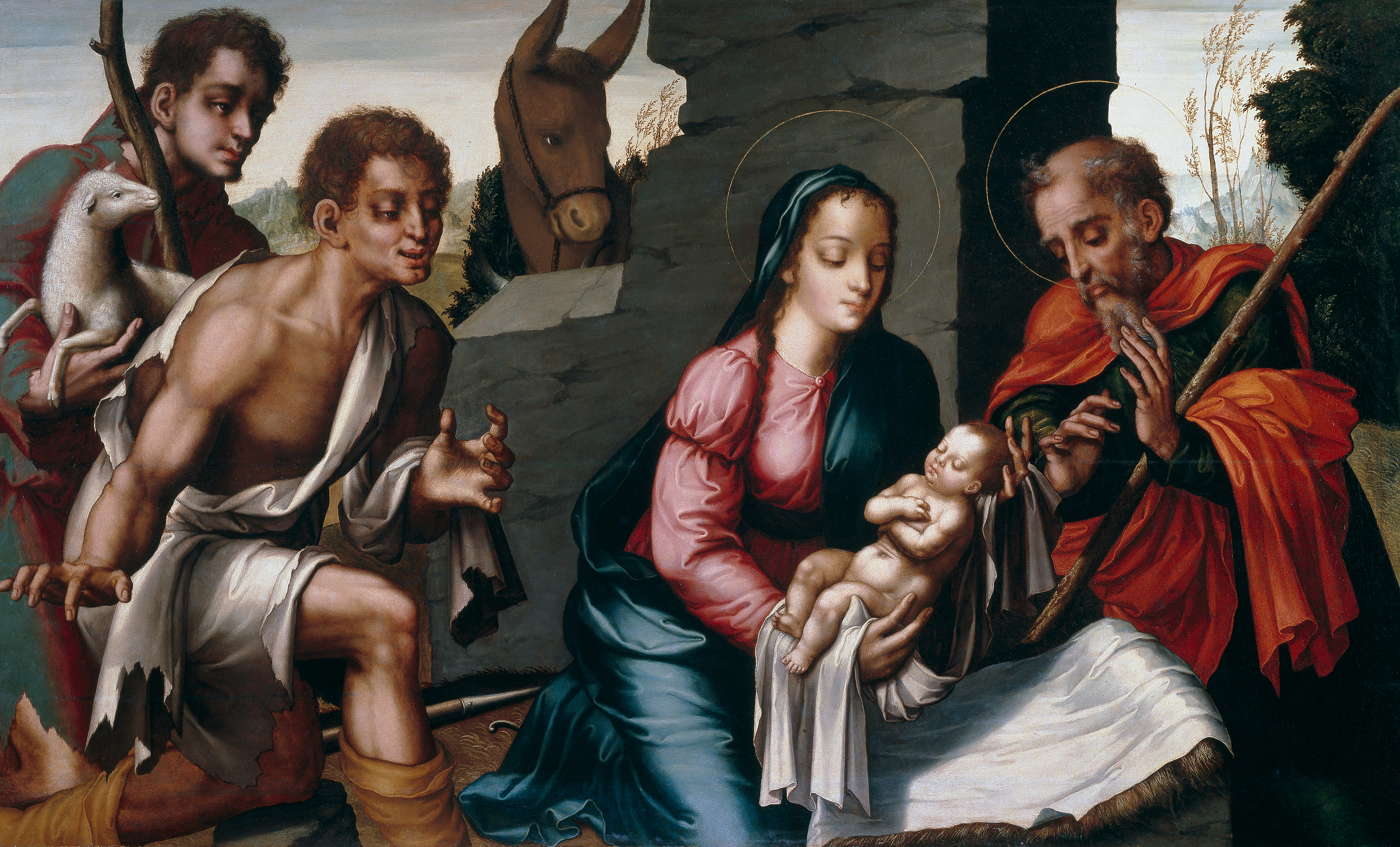 La obra representa el momento en que el Niño Jesús fue adorado por los pastores de Belén poco después de su nacimiento en dicho lugar.